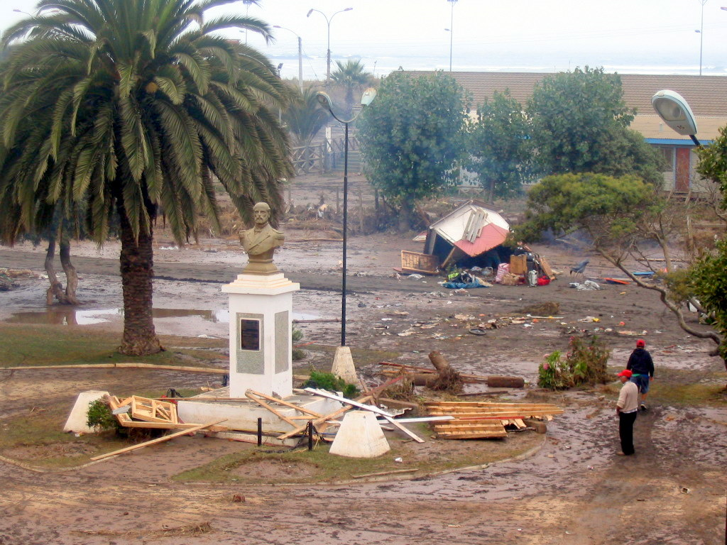 La plaza Arturo Prat y quioscos alrededor de ella después del terremoto de Chile de 2010 en Chile.